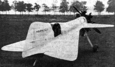 Payen PA-101